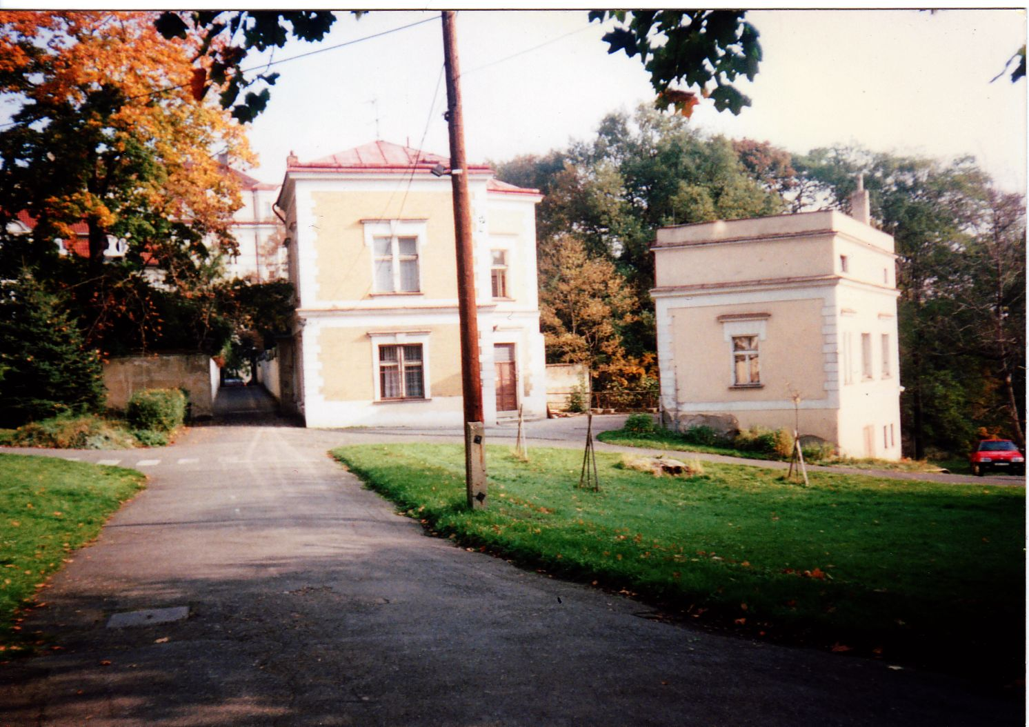 Zahrada ZŠ pro slabozraké, pohled směrem do vstupního koridoru, vpravo budovy - družina, SPC, dílny, cesta dolů směrem k hřišti a pozemkům, dnes Vile Vinohrady.